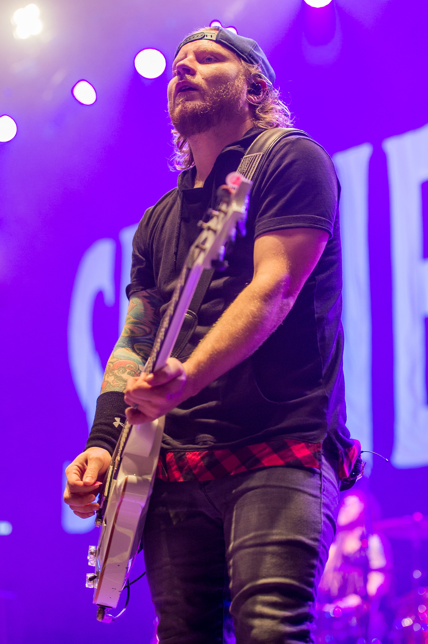 ARGO-Konzerte,Alternarena,Festival,Konzert,Livekonzert,Livemusik,Musik,RiP,Rock im Park 2016,Shinedown,Zach Myers